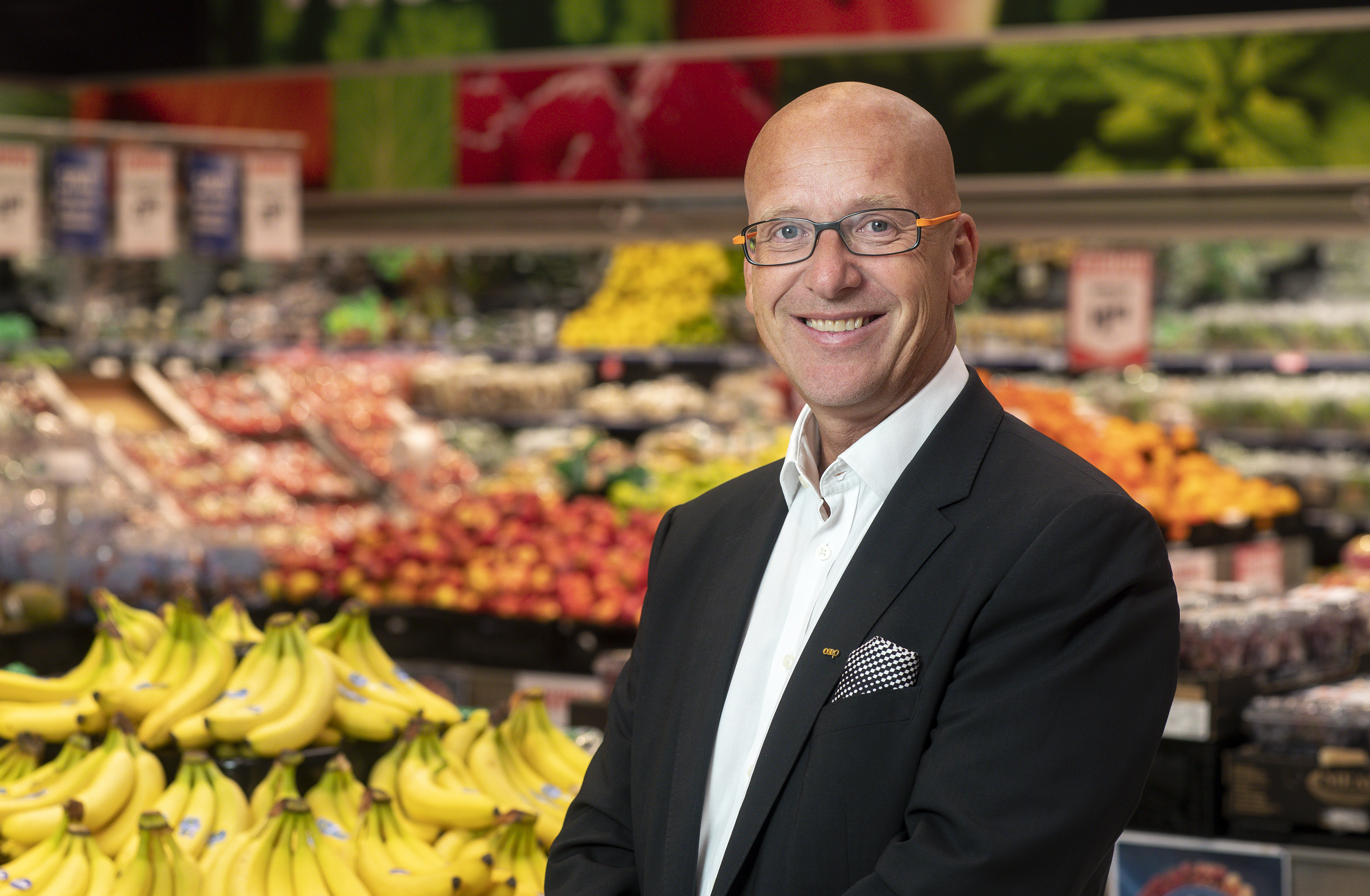 Konsernsjef i Coop Norge, Geir Inge Stokke.